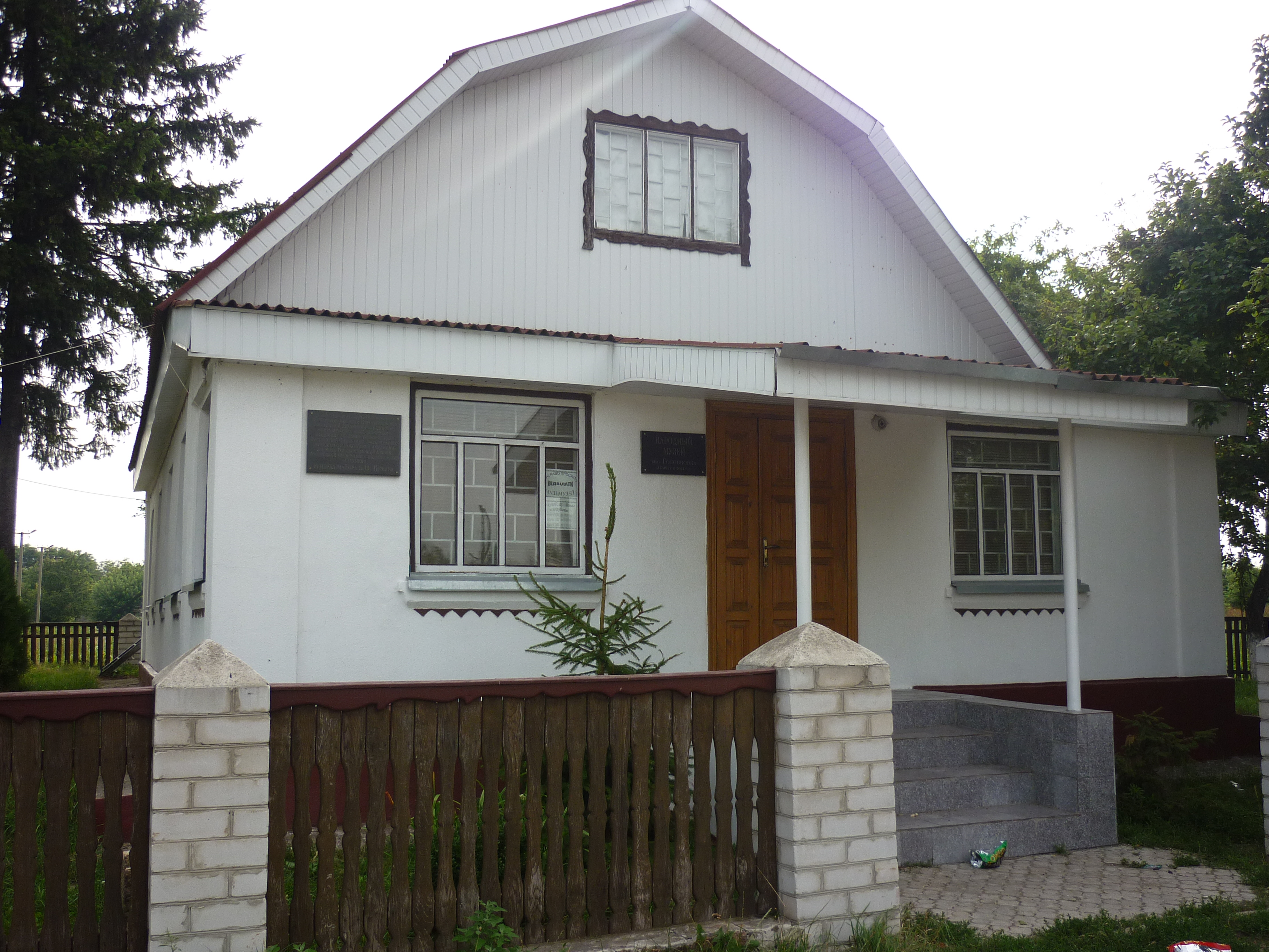 село Головківка Чигиринського району Черкаської області. Музей